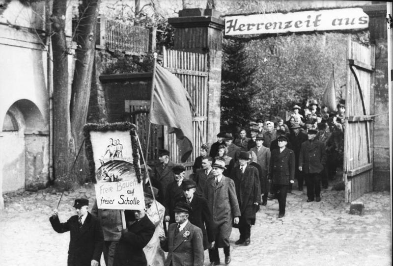 Bodenreform in der SBZ ADN-ZB/Höhne-Pohl Die Bodenreform in der sowjetischen Besatzungszone Deutschlands 1945. Am 11. September 1945 erlebten die Gemeinden Rockau, Cunnersdorf und Helfenberg bei Dresden die Aufteilung des ehemaligen "Königlichen Rittergutes" Helfenberg. [Helfenberg bei Dresden.- Demonstrationszug durch Tor mit Überschrift "Herrenzeit aus", Plakat mit Text "Freie Bauern auf freier Scholle"]